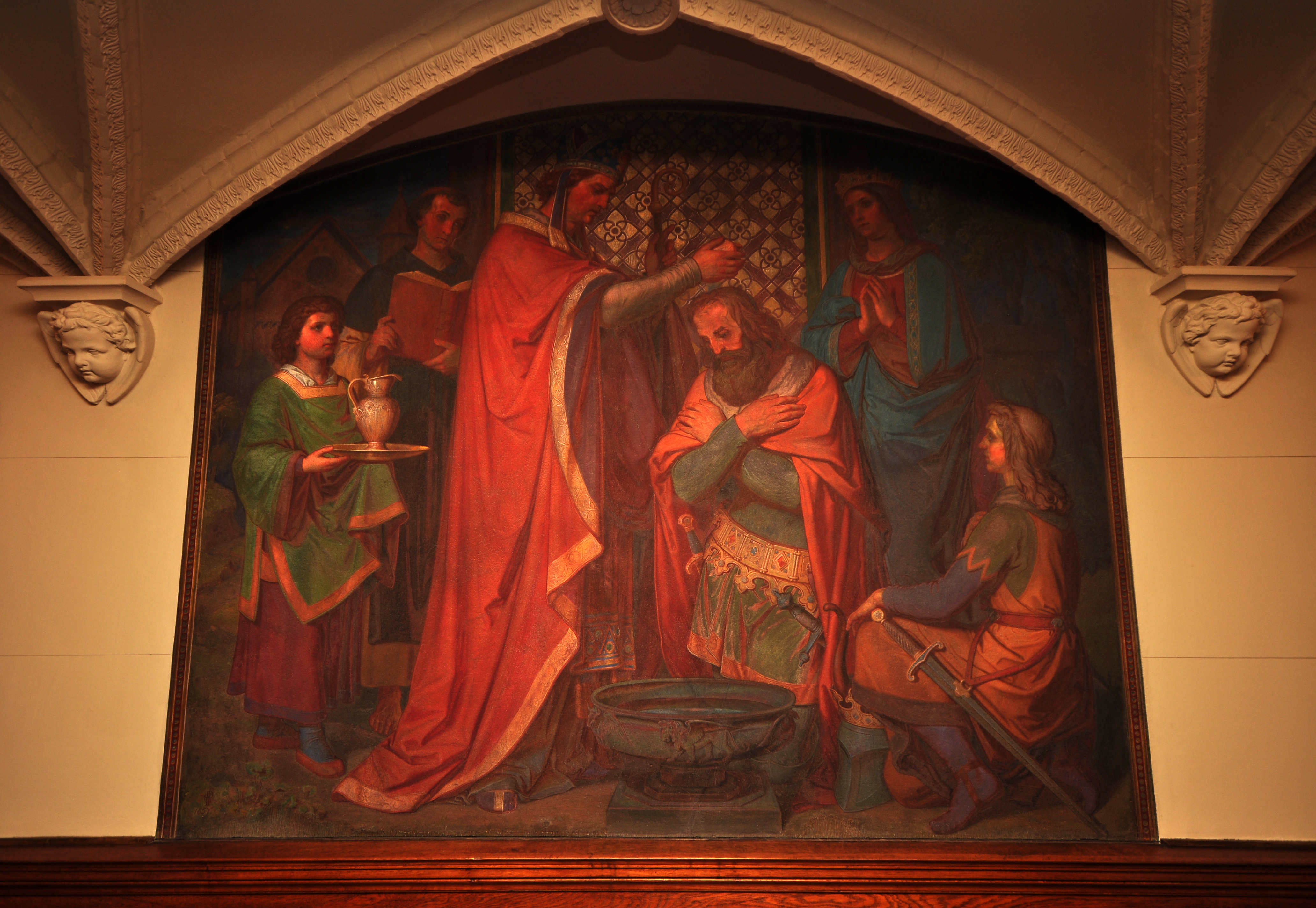 06-06-2015-Schlosskirche-Schwerin-JonasR 04